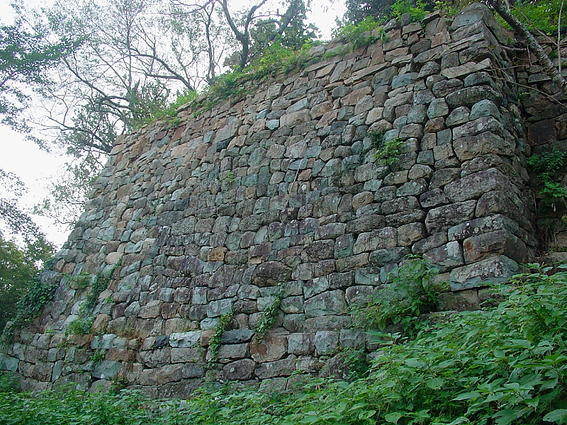 金山城本丸石垣